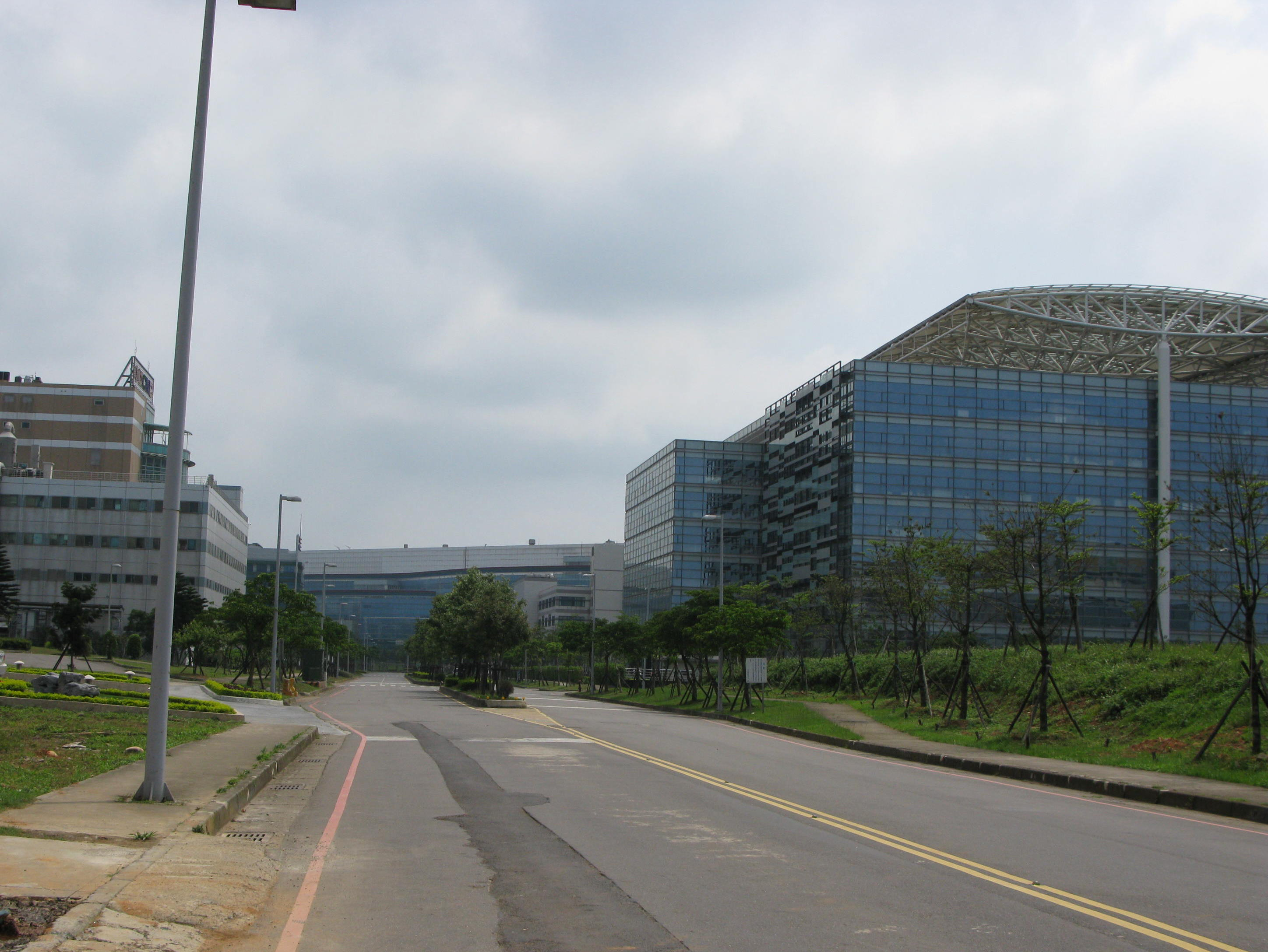 HuaYa Science Park, Taiwan.